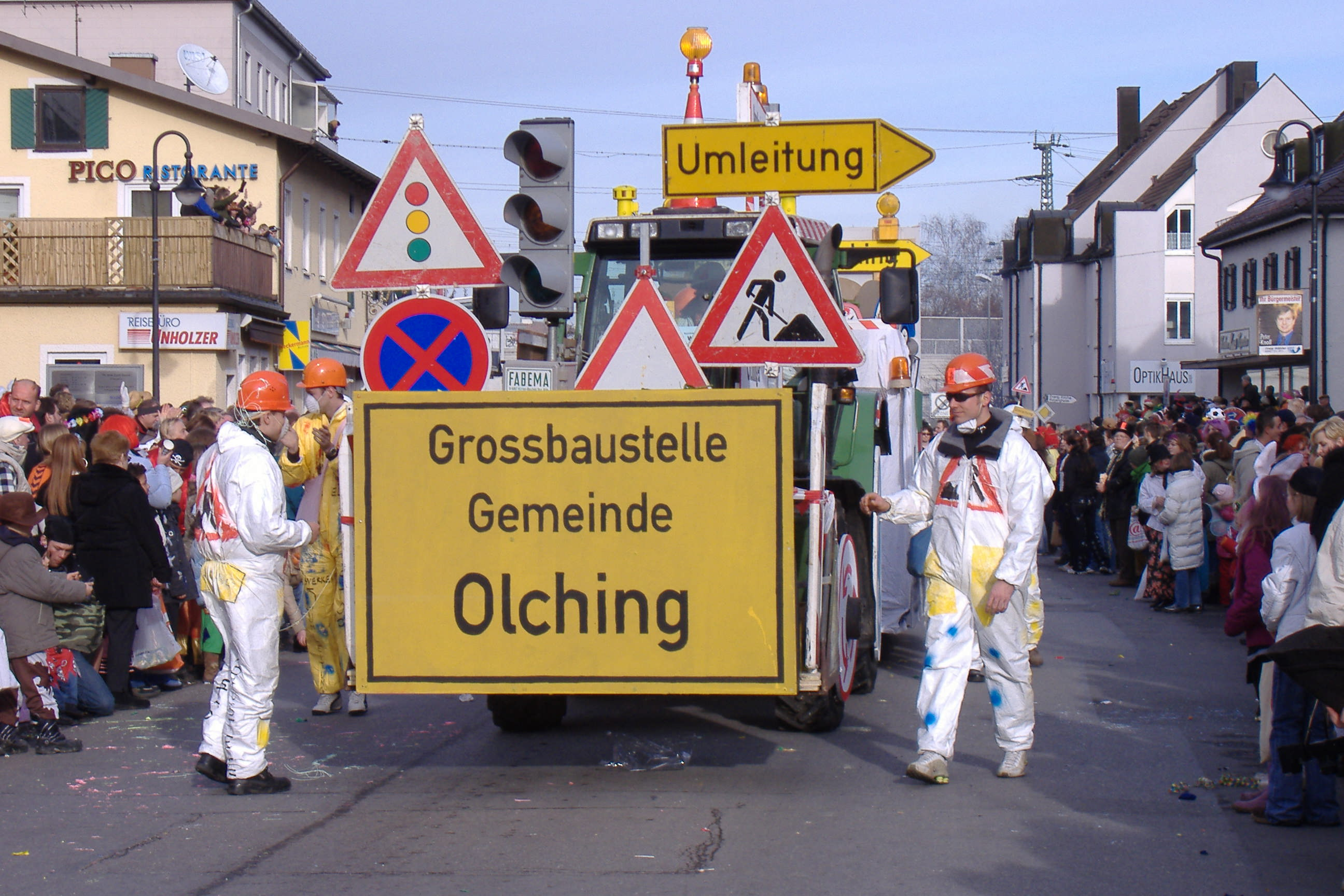 Olching Faschingsumzug Baustelle